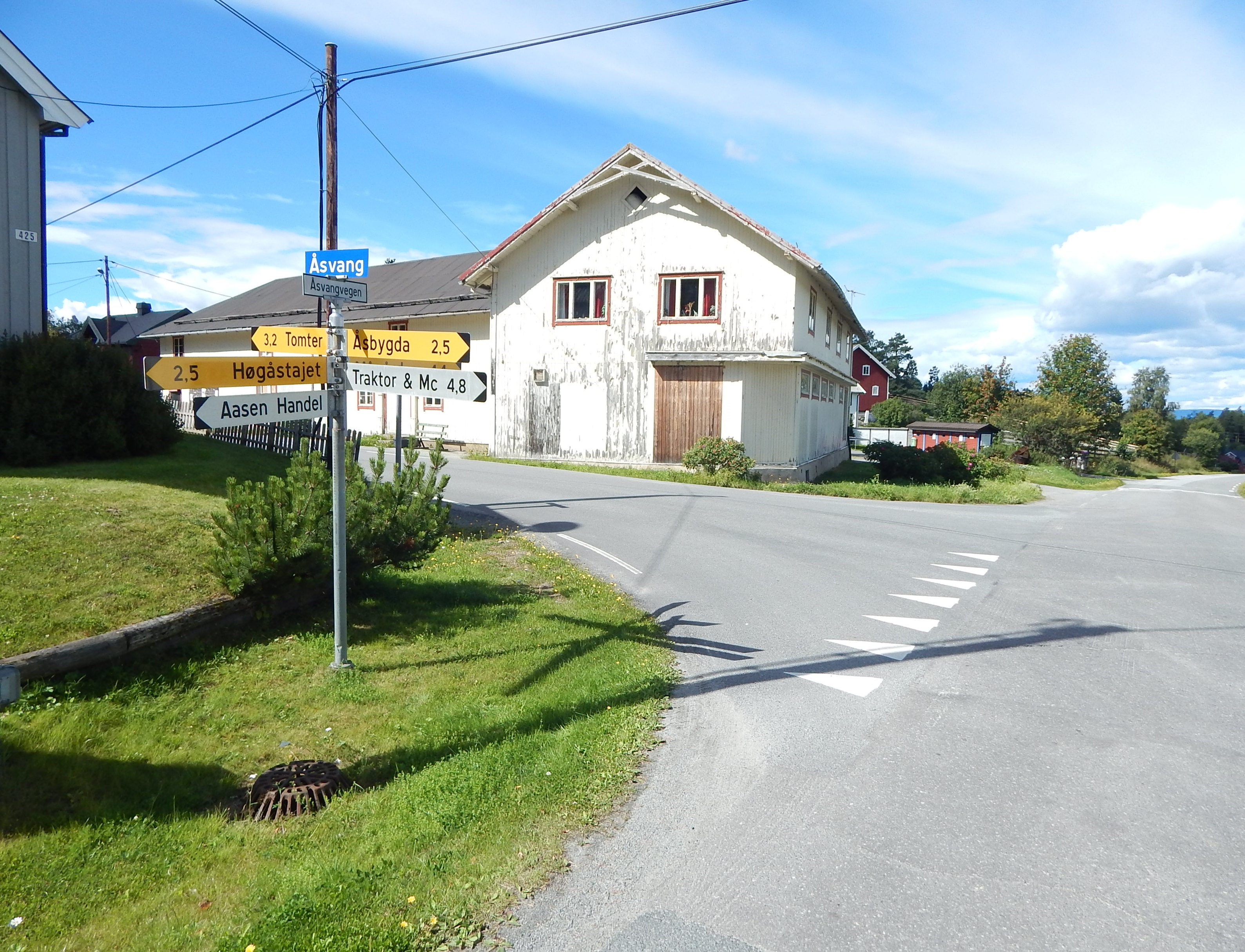 Åsvang i Stange kommune. Fylkesvei 1914 (Åsvangvegen, innover i bildet) krysser fylkesvei 1886.